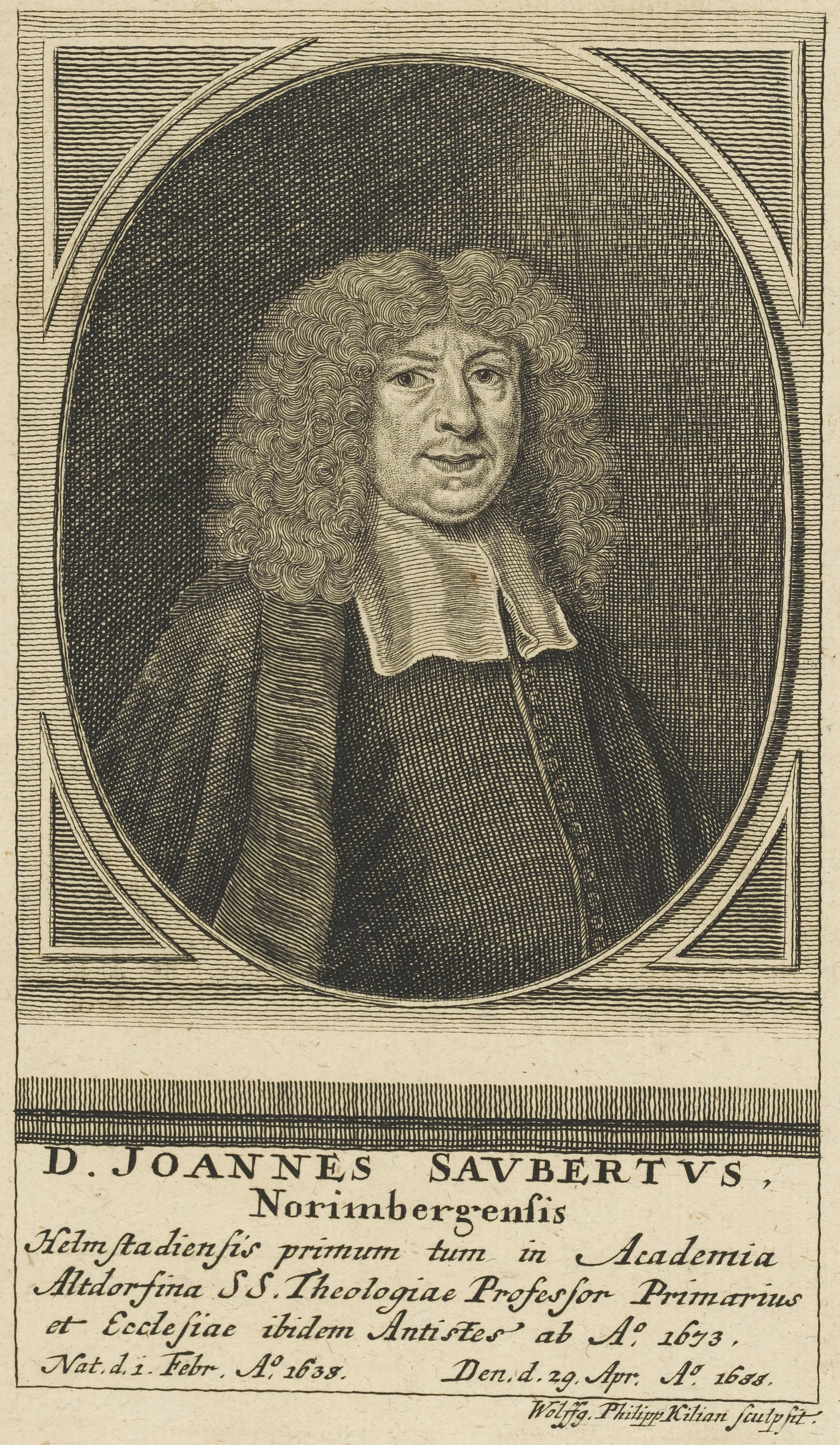 Depicted person: Johannes Saubert der Jüngere